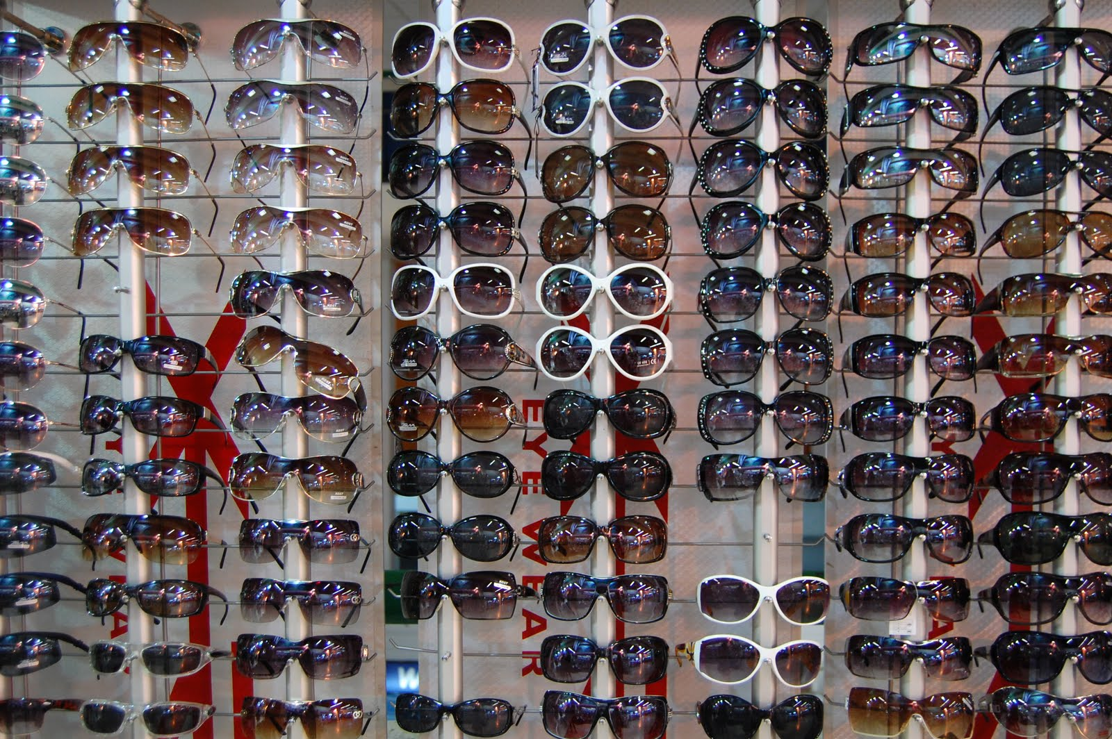 משקפי שמש